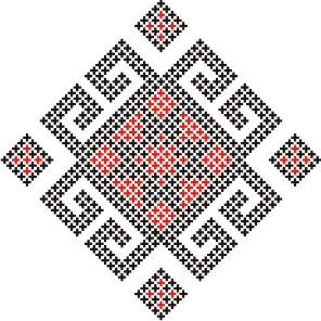 Fragmento del diseño de un quexquémitl bordado, de la Sierra Norte de Puebla, México.